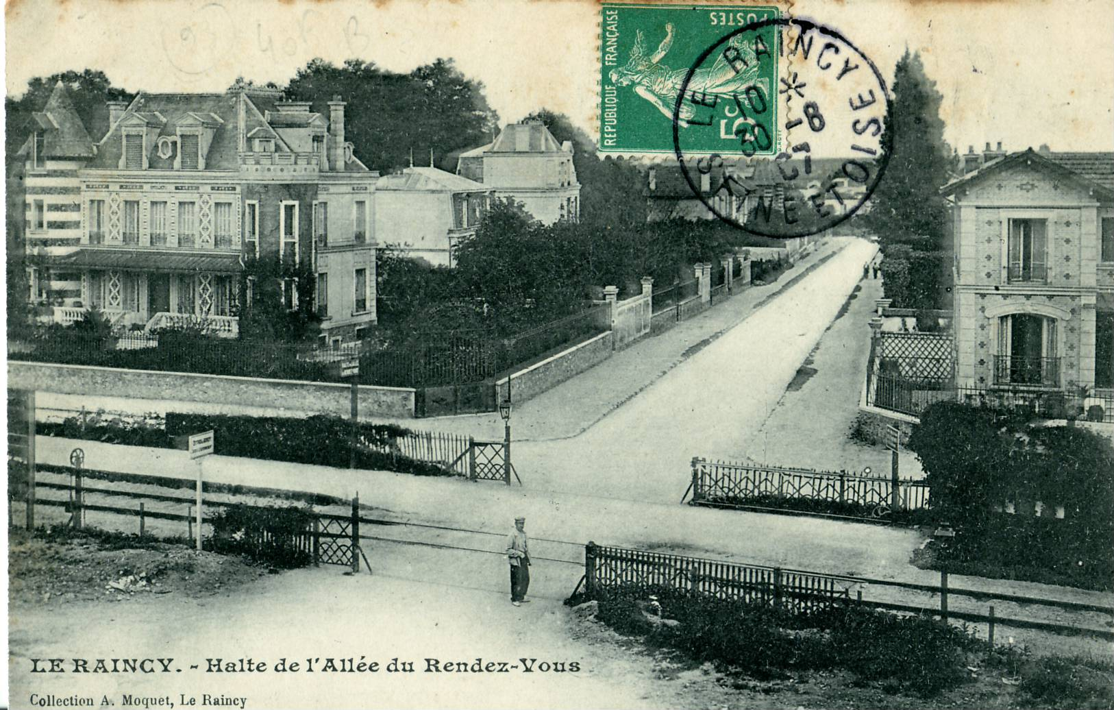 Carte postale ancienne éditée par Moquet au RaincyLE RAINCY : Halte de l'Allée du Rendez-vousLa halte initiale de l'Allée de la Tour, avant qu'elle ne soit juxtaposée avec celle de l'Allée de la Tour pour former la station de l'Allée de la Tour - Rendez-Vous. La section de ligne Aulnay - Gargan est encore à voie unique.